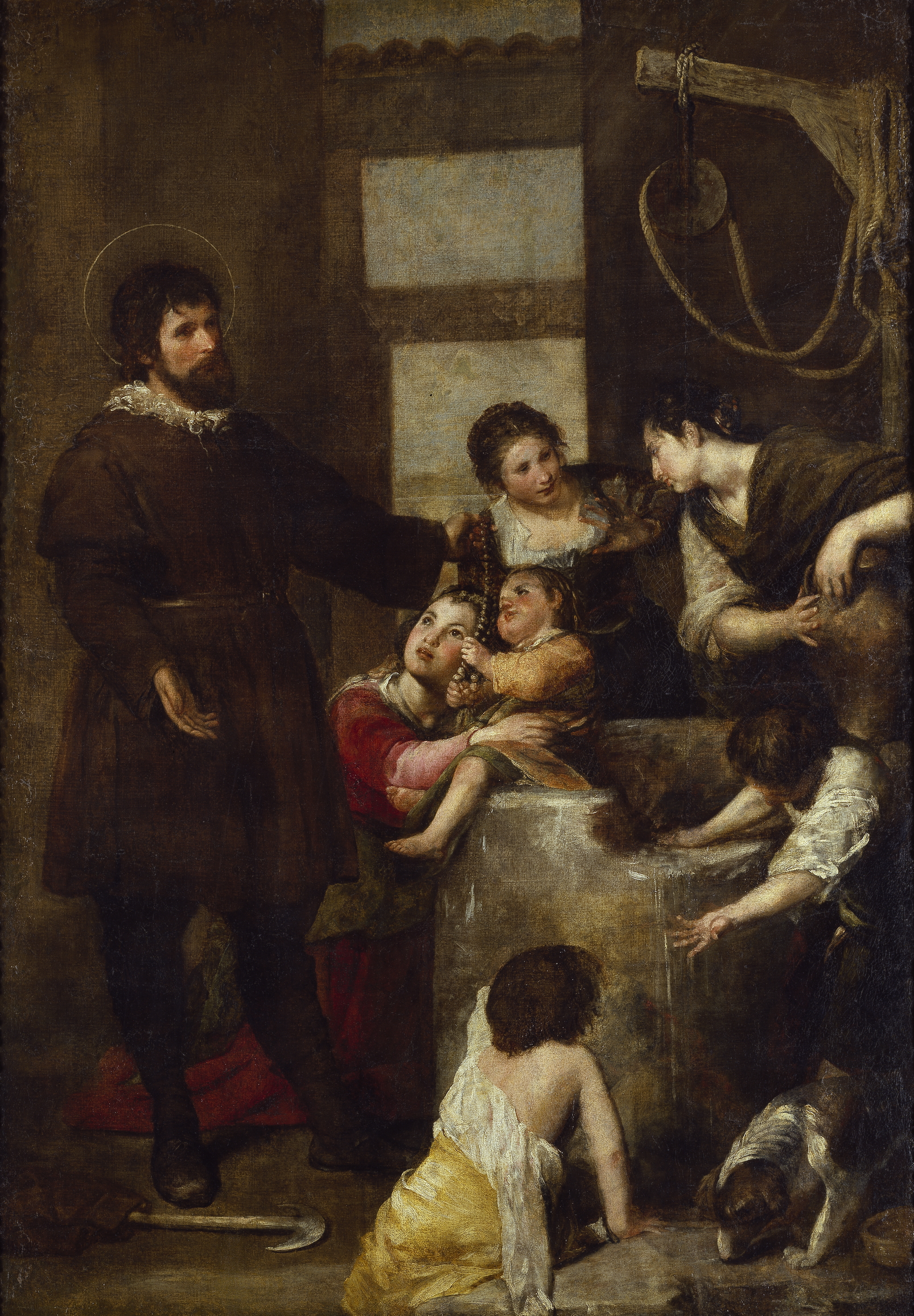 La obra representa un pasaje de la vida de San Isidro Labrador y de su esposa, Santa María de la Cabeza, ya que en una ocasión en que su hijo había caído a un pozo, las oraciones de sus padres consiguieron que el agua del mismo subiera hasta devolver a la superficie al niño.